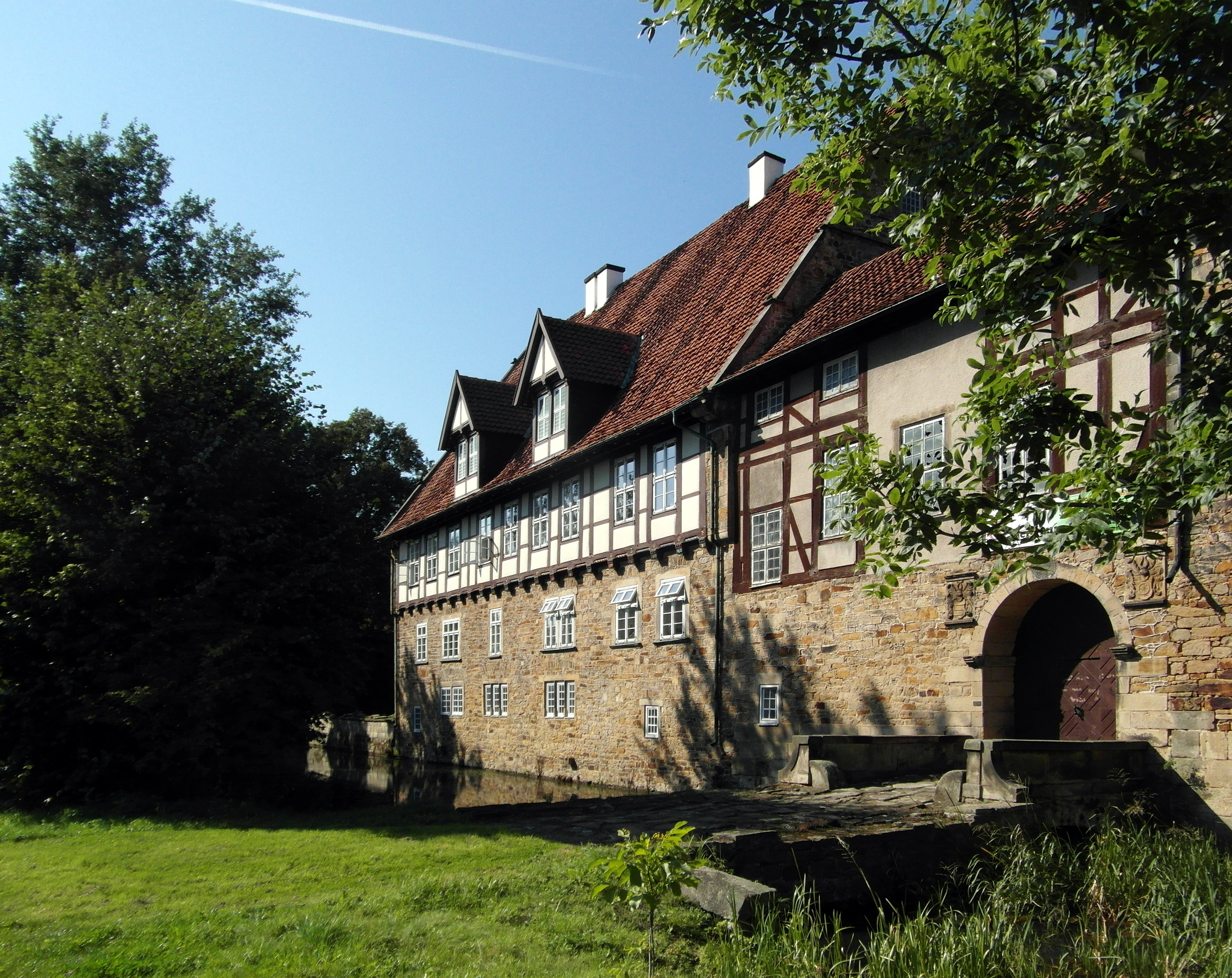 Graben und Wohnhaus an der Südseite des Gutes Nordgoltern. Das Wohnhaus des Gutes wurde 1713 errichtet.